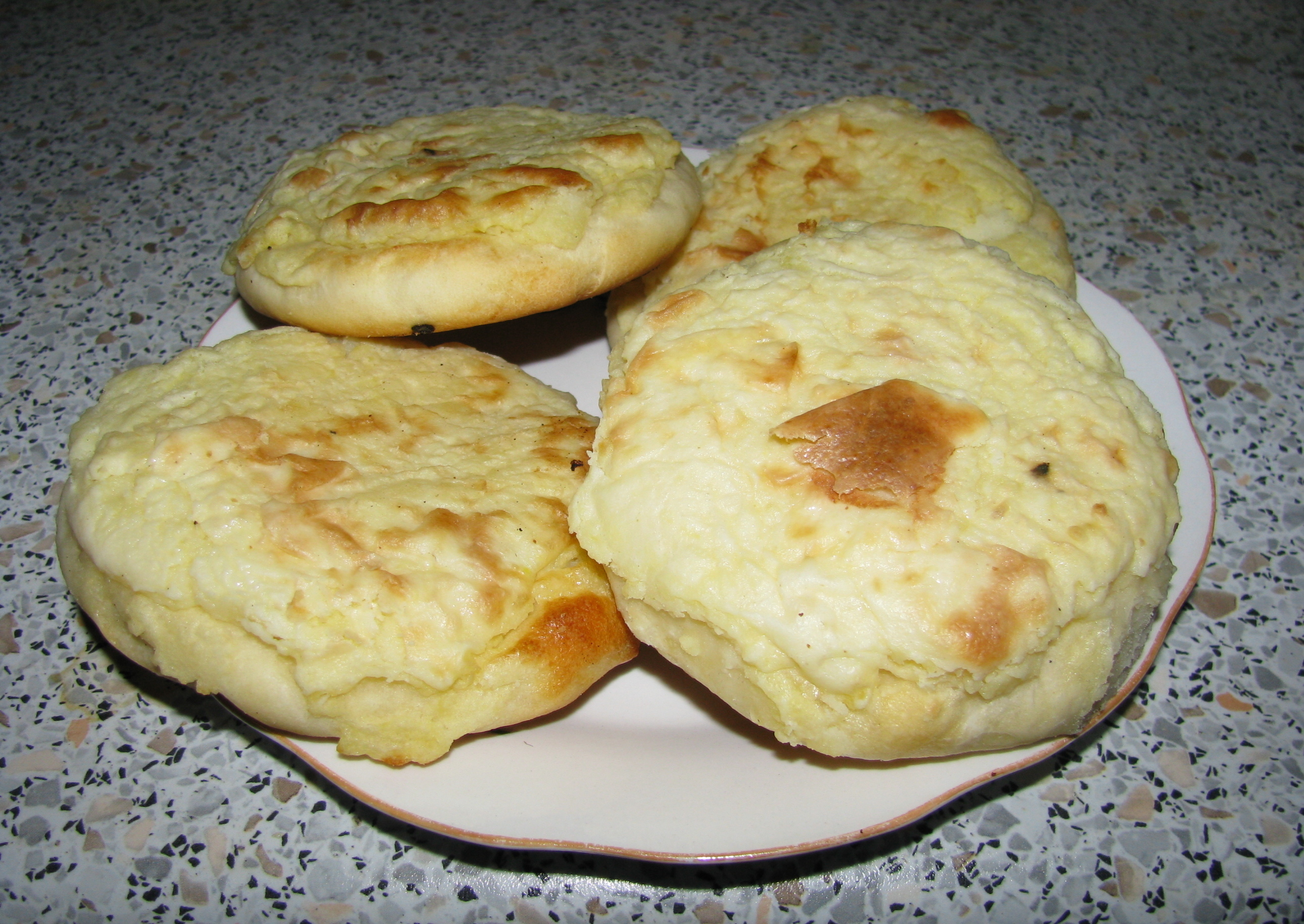 Шаньги